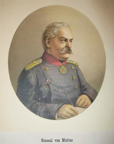 General Louis von Mutius ("(beim Vortrage)") (1796 - 1866) [1]